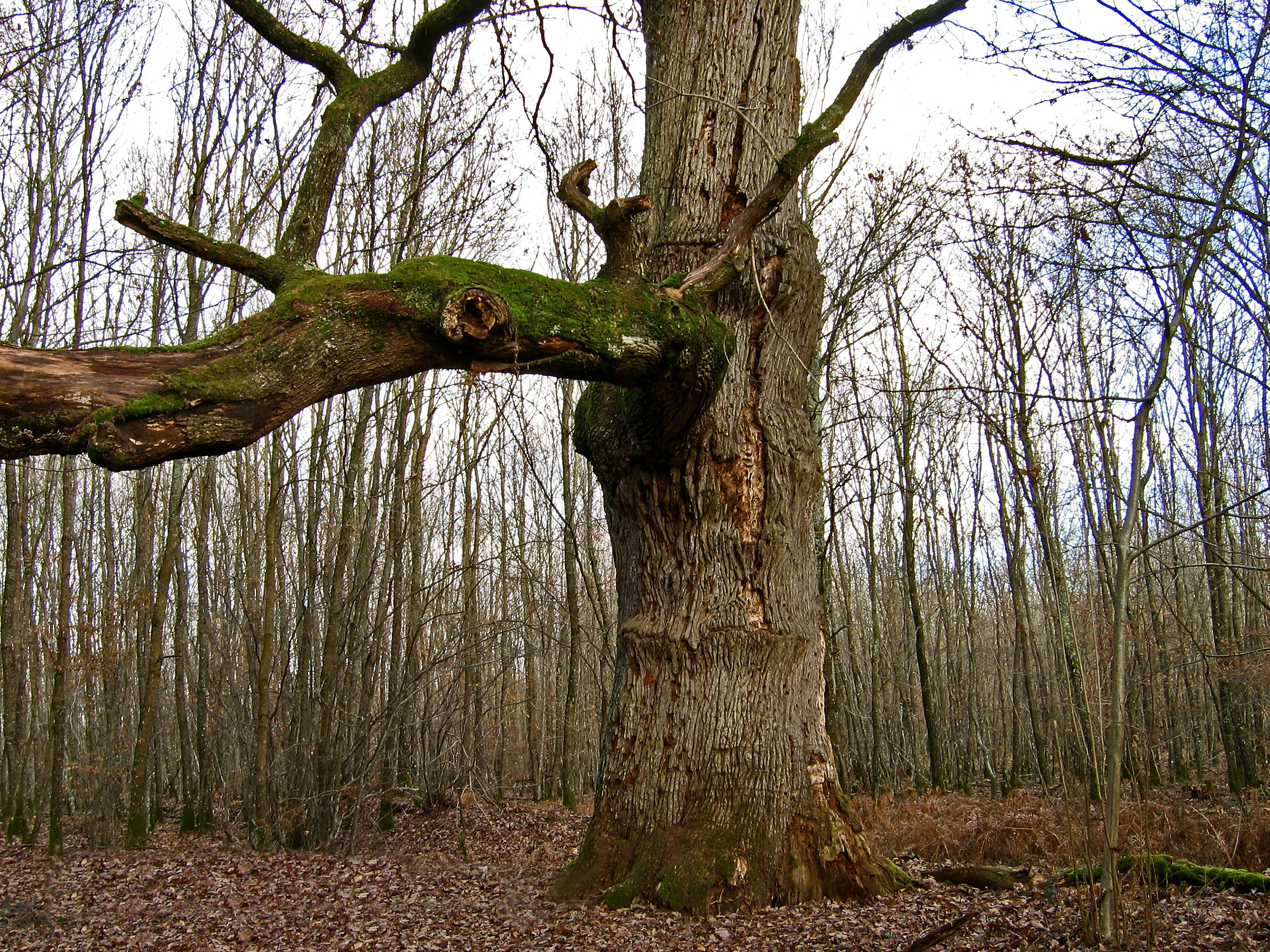 Chêne de Montaloyer (ou de Piperon), situé à la limite des communes de Braize, Urçay et Vitray; c'est l'un des 9 arbres choisis pour conserver le nom des anciennes circonscriptions territoriales de La Forêt de Tronçais.Naissance présumée vers 1630... La légende prétend qu'une statue de la Vierge est cachée dans une "cabotte" de son tronc, pour la soustraire à "ceux de la nouvelle religion" qui déferlaient sur le pays au XVIème siècle...